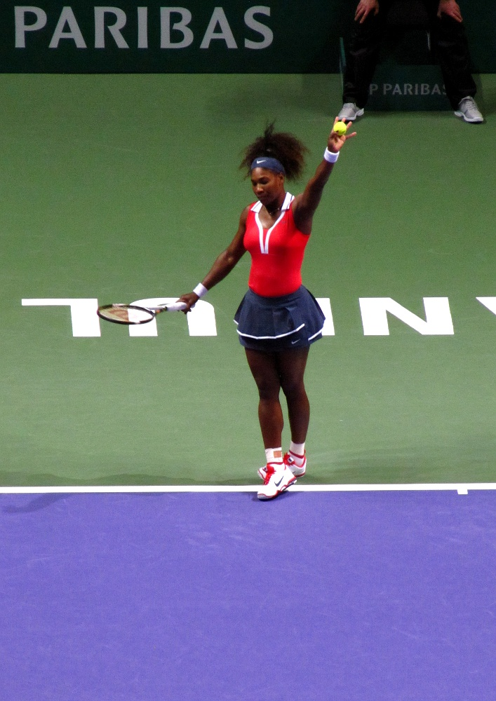 Serena Williams w kończących sezon Mistrzostwach WTA w Stambule - 2012